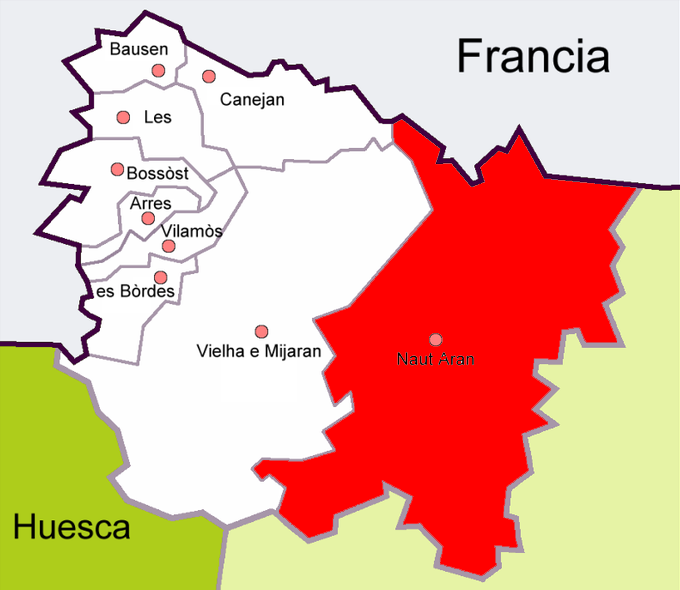 Municipio de Naut Aran